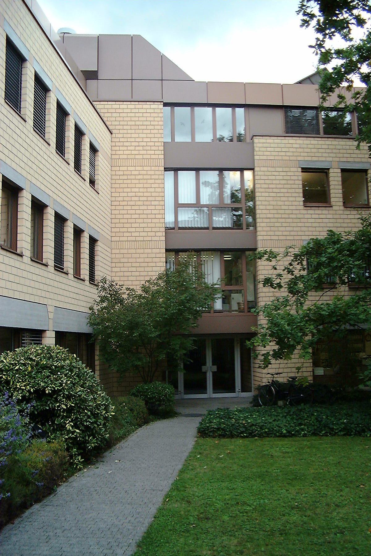 Bürogebäude Gellertstrasse, Basel/Schweiz